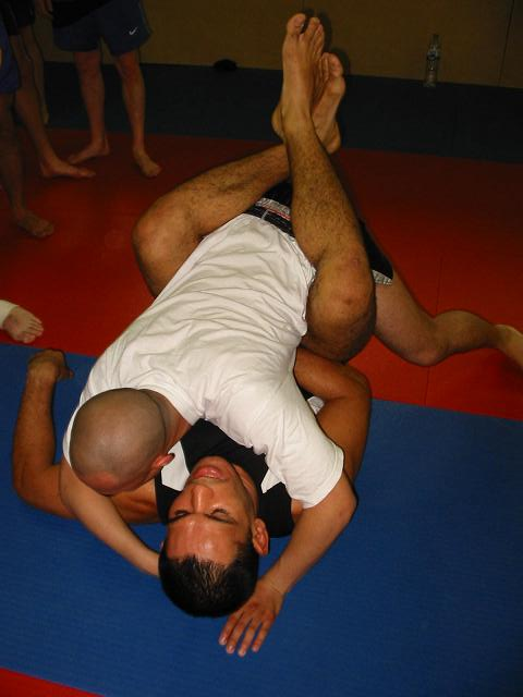 Je suis l'auteur de cette photo, prise en 2004, lors d'un stage de Minotauro à Paris.